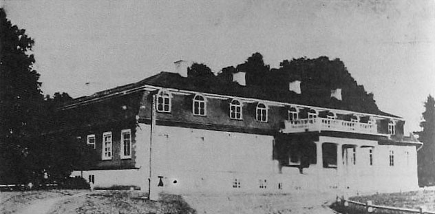 Беларуская (тарашкевіца): Каханавічы (Kachanavičy), сядзіба Храпавіцкіх (Chrapavicki)